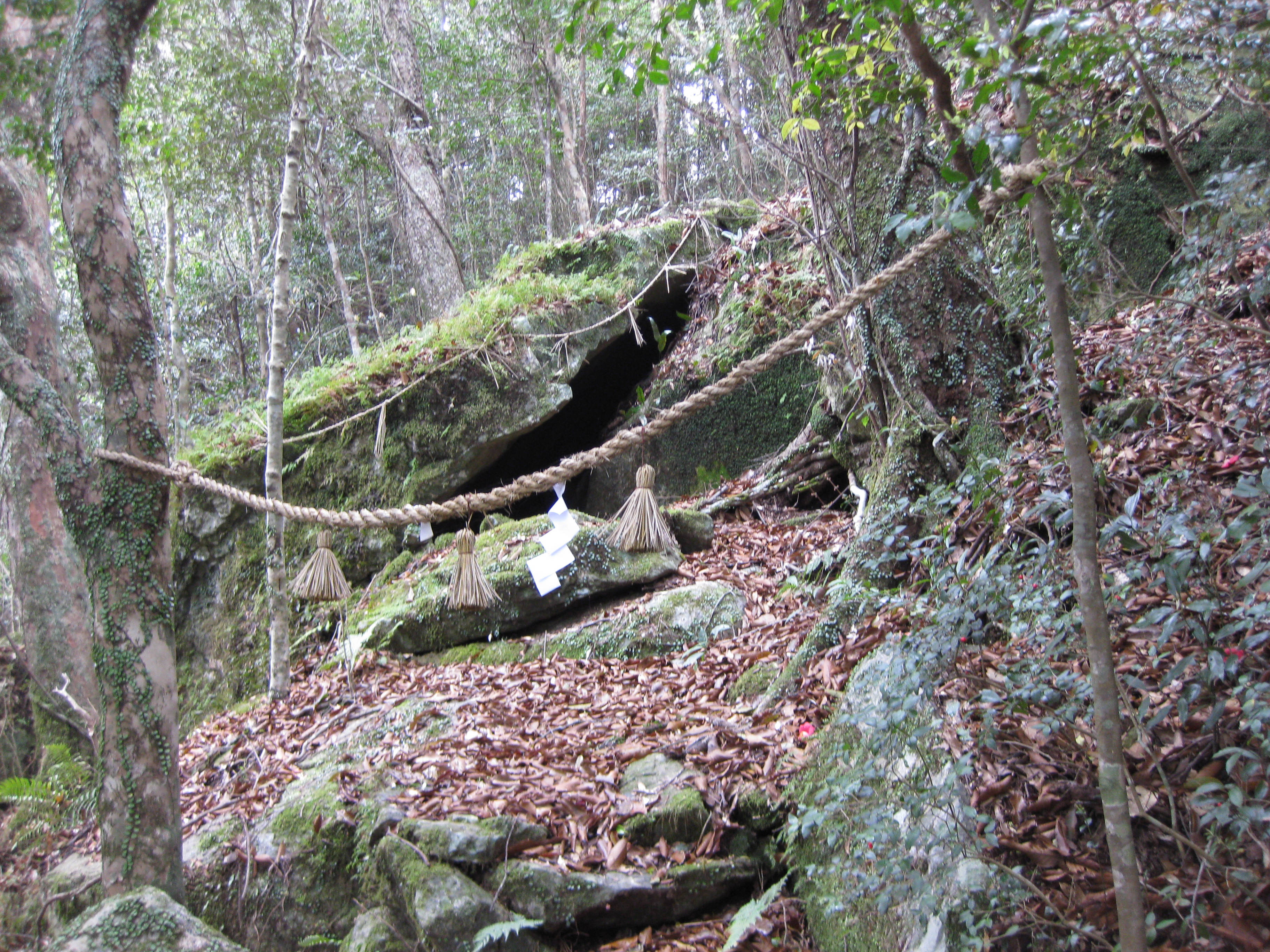 新上五島町荒川郷 雄嶽日枝神社